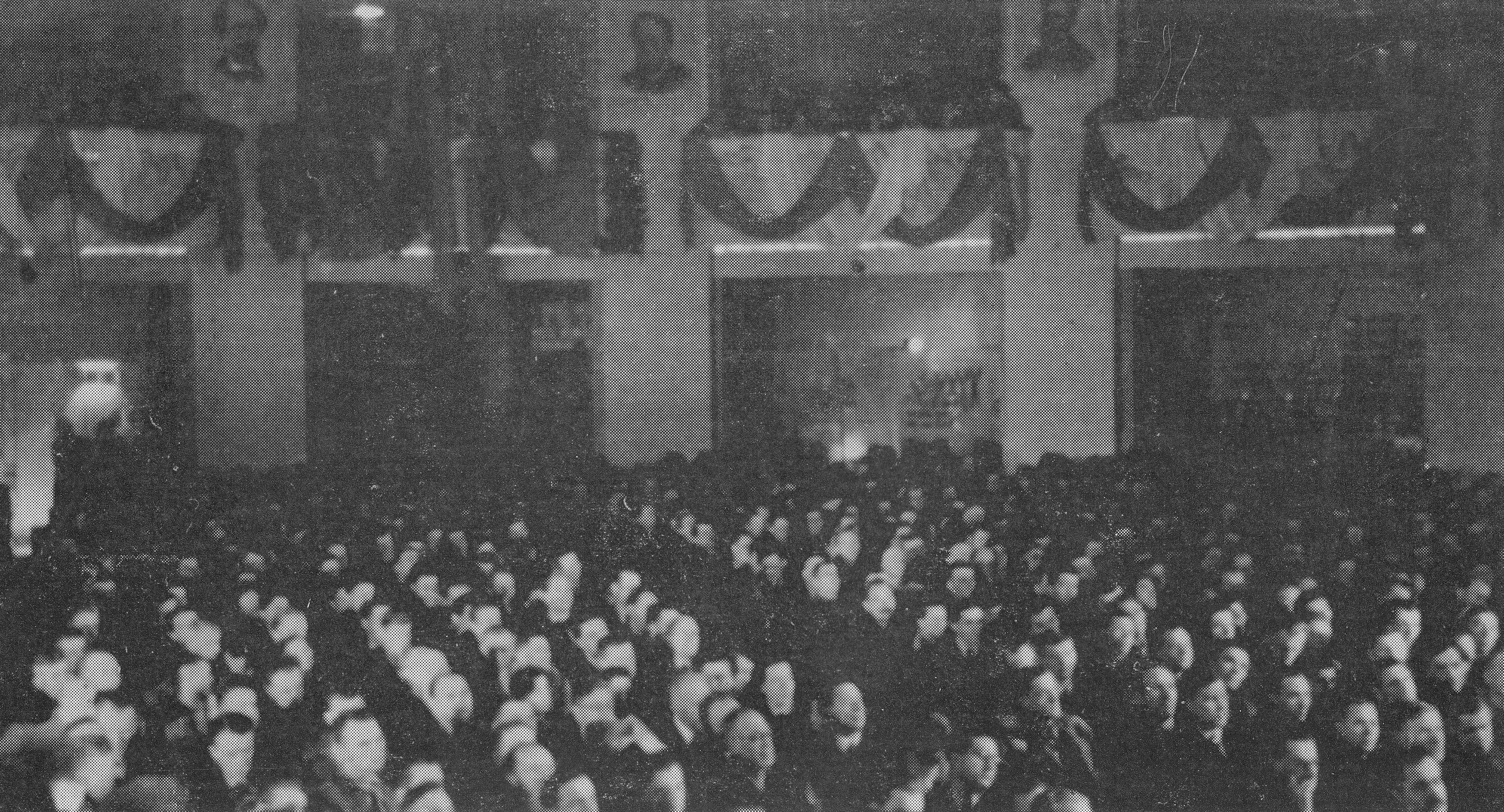 I Zjazd Polskiej Partii Robotniczej 6-13 grudnia 1945. Sala Romy w Warszawie